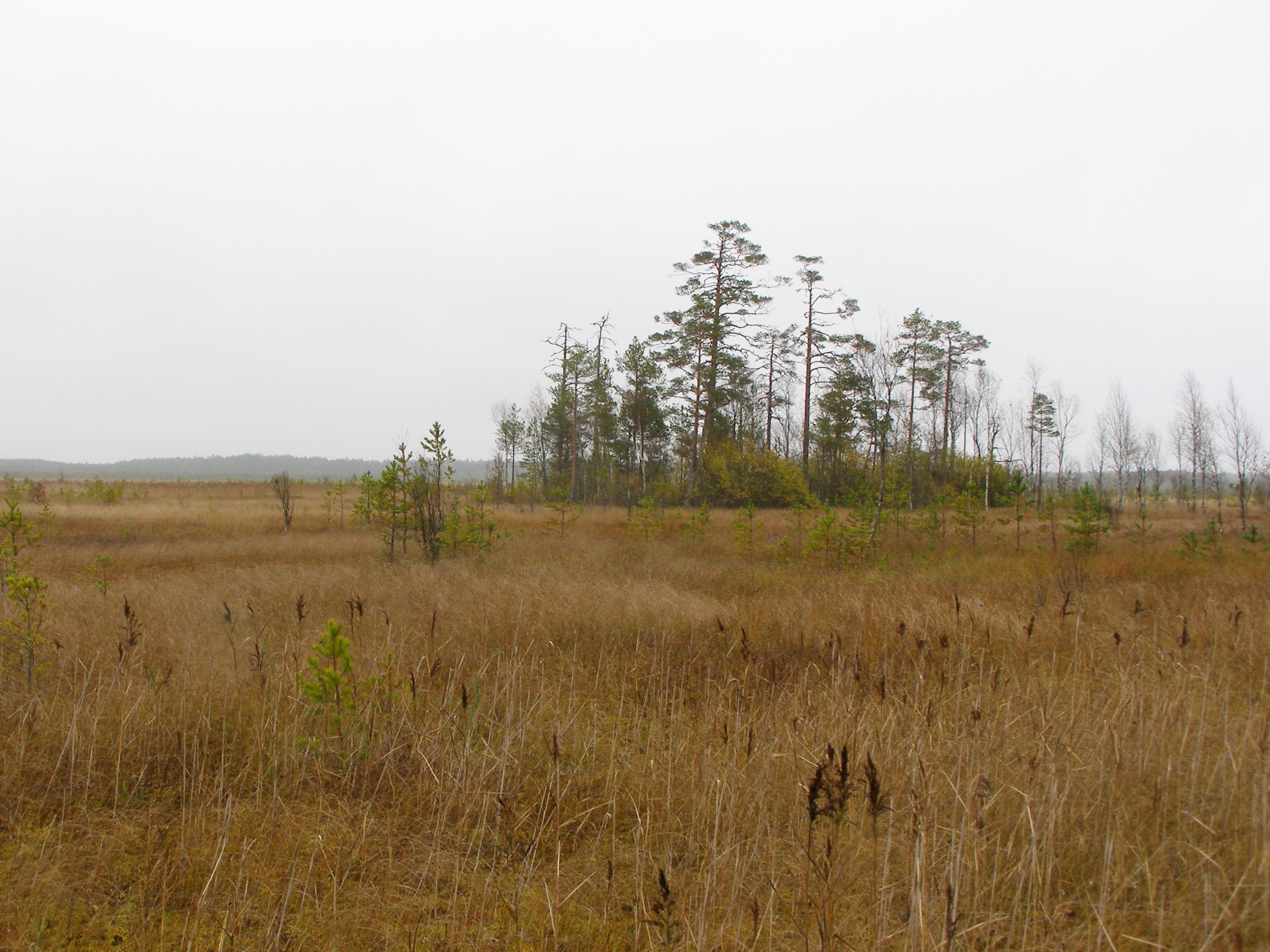 Muraka raba lõunaosa